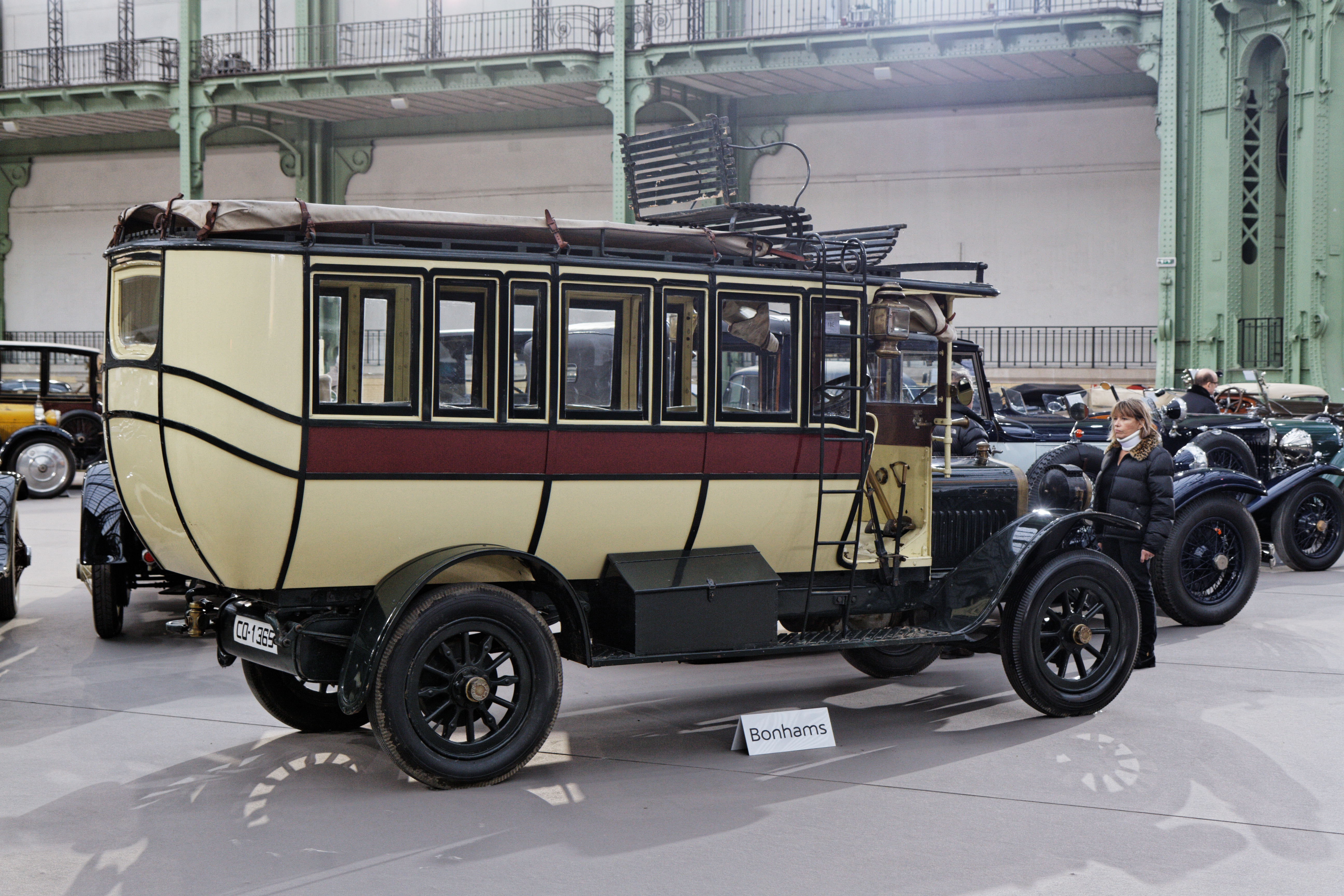 Une Hispano-Suiza 15 20HP Omnibus au Grand Palais lors de la vente Bonhams en février 2014.